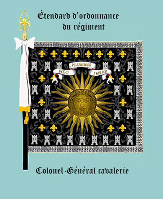 Standarte des Regiments „Colonel Géneral cavalerie“ Königreich Frankreich 1668-1791